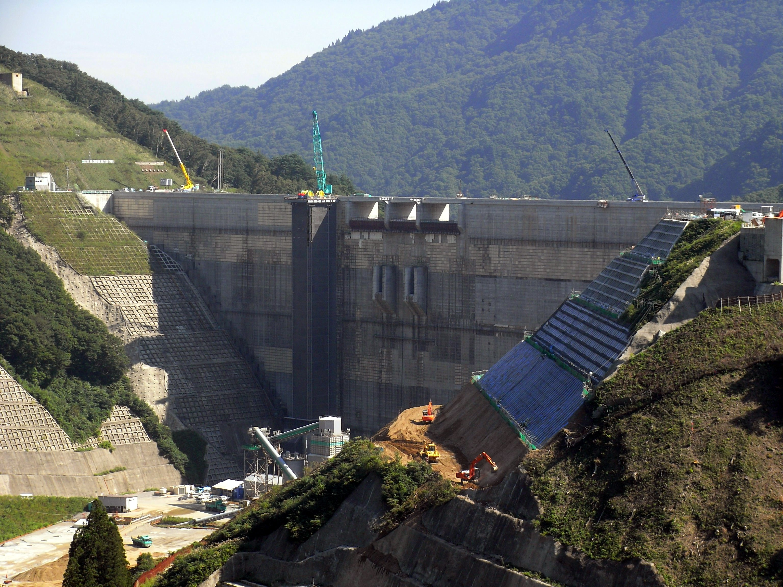 Dam